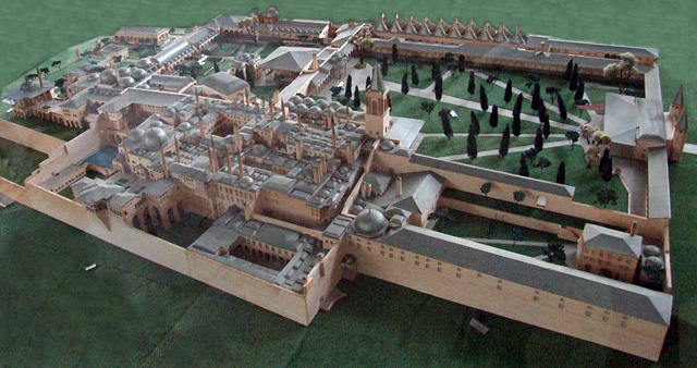 Topkapi Sarayi - Maket